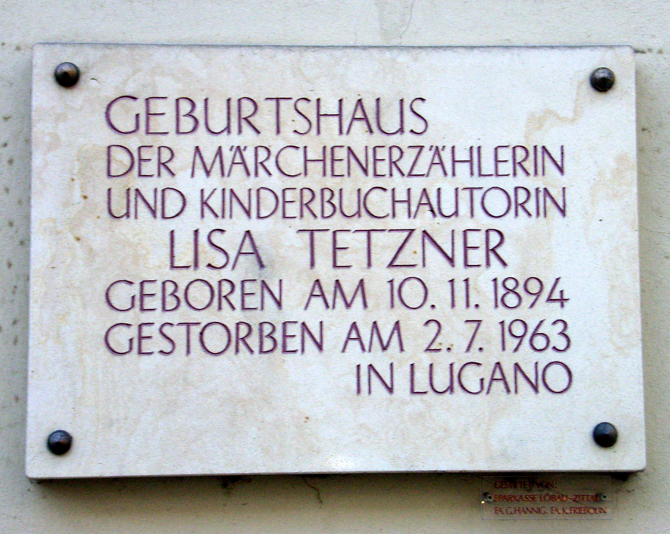 Gedenktafel am Geburtshaus von Lisa Tetzner in Zittau